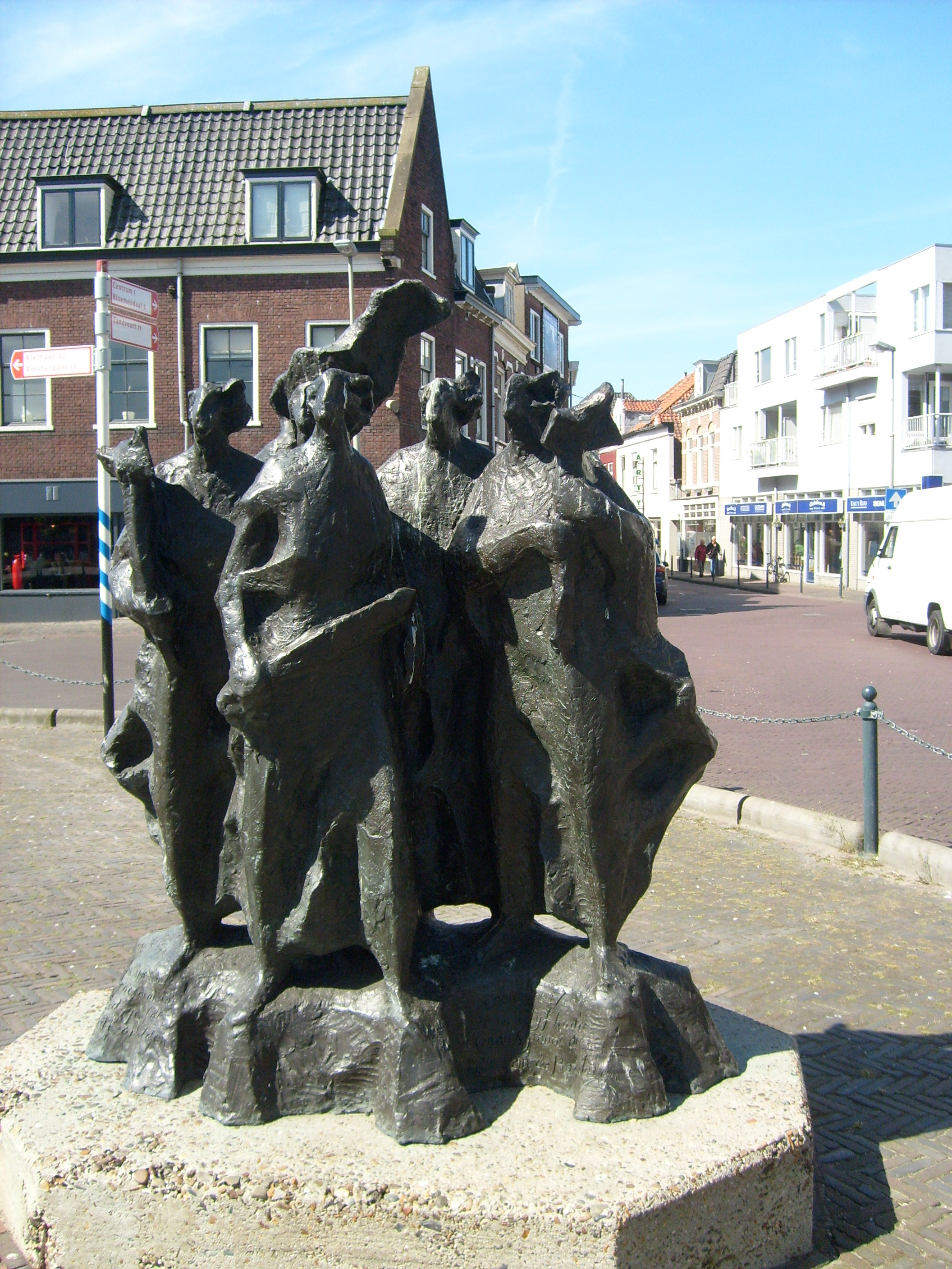 Kenau en de Haarlemse Vrouwen, datum: 1973. Kunstenaar: Theo Mulder. Locatie: Haarlem, Amsterdamse Poort. Materiaal: Brons